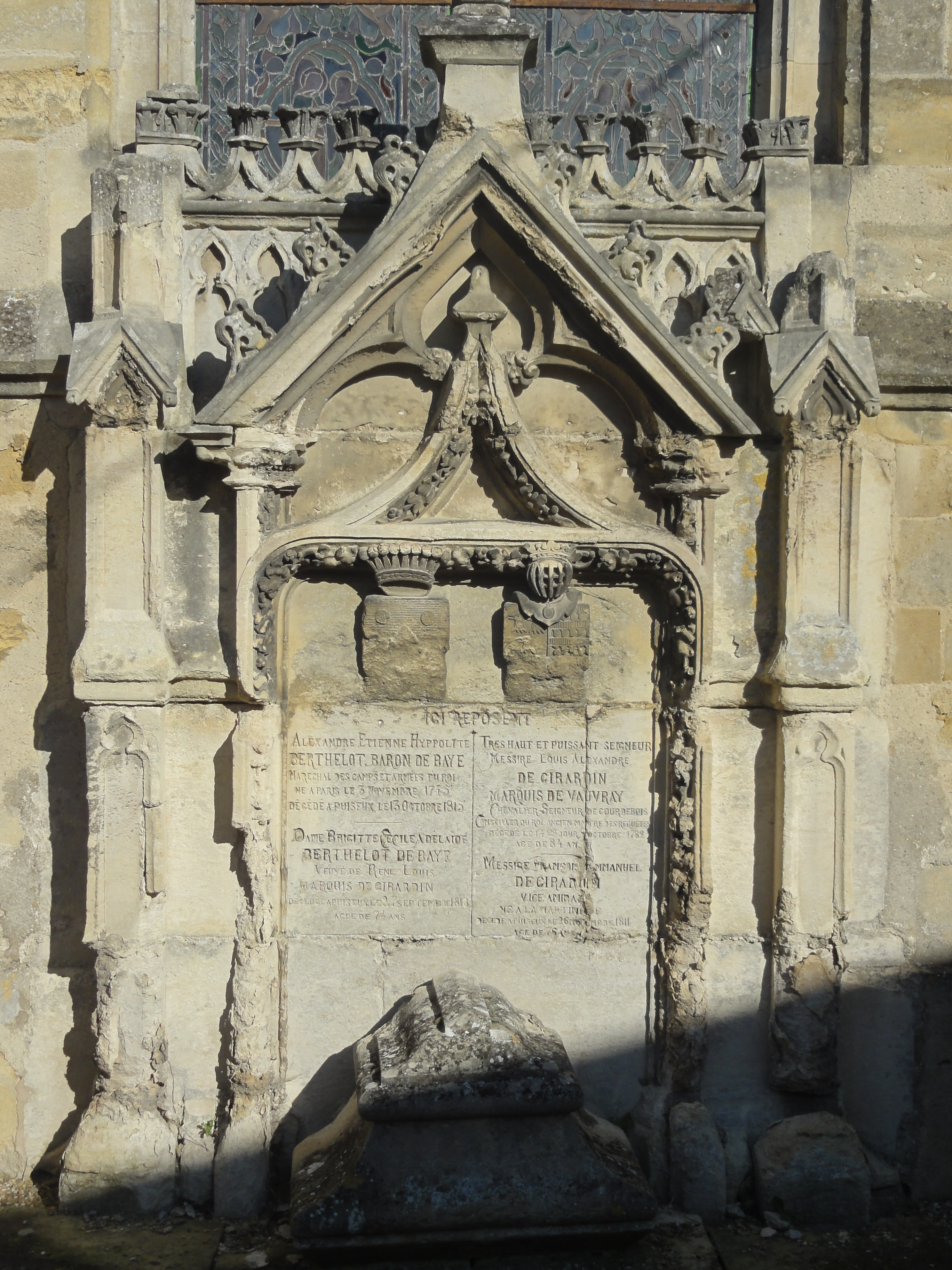 Monument funéraire des familles Berthelot de Baye et de Girardin.